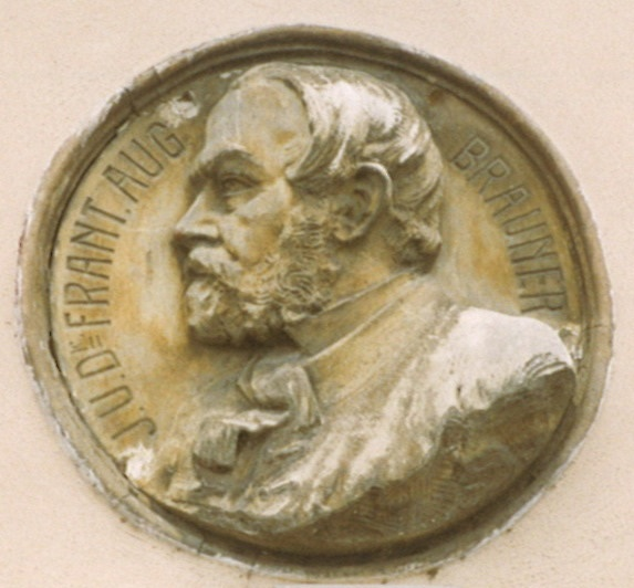 Velké náměstí 109, Velké náměstí 109/55, Kroměříž, pamětní deska Františka Braunera od Jana Neumanna.